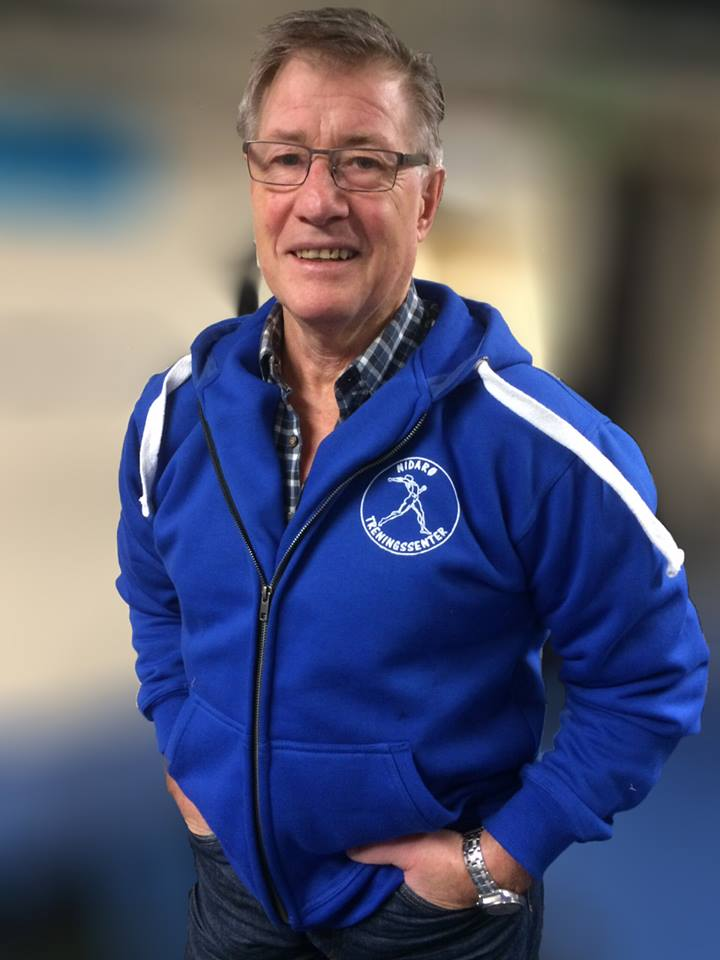 Johan i sitt arbeidsantrekk. Bildet er fra 2015